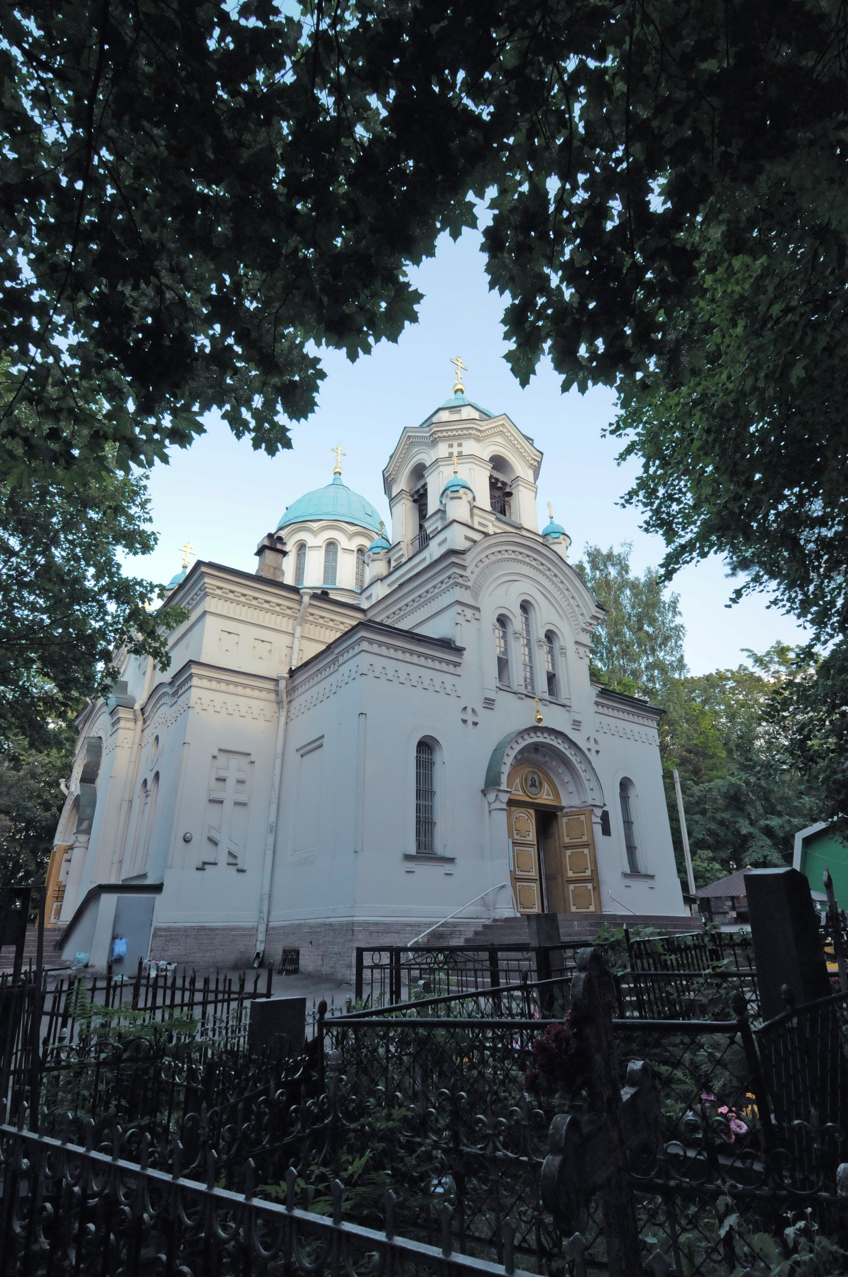 Спасо-Парголовский собор на Шуваловском кладбище в Санкт-Петербурге